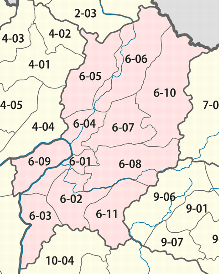 Giấy phép